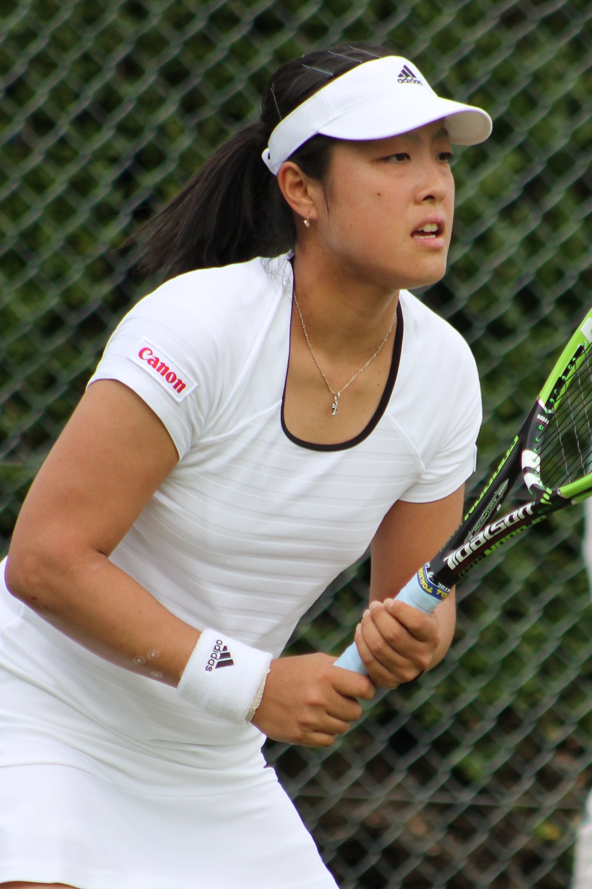 Morita WMQ15 (6)